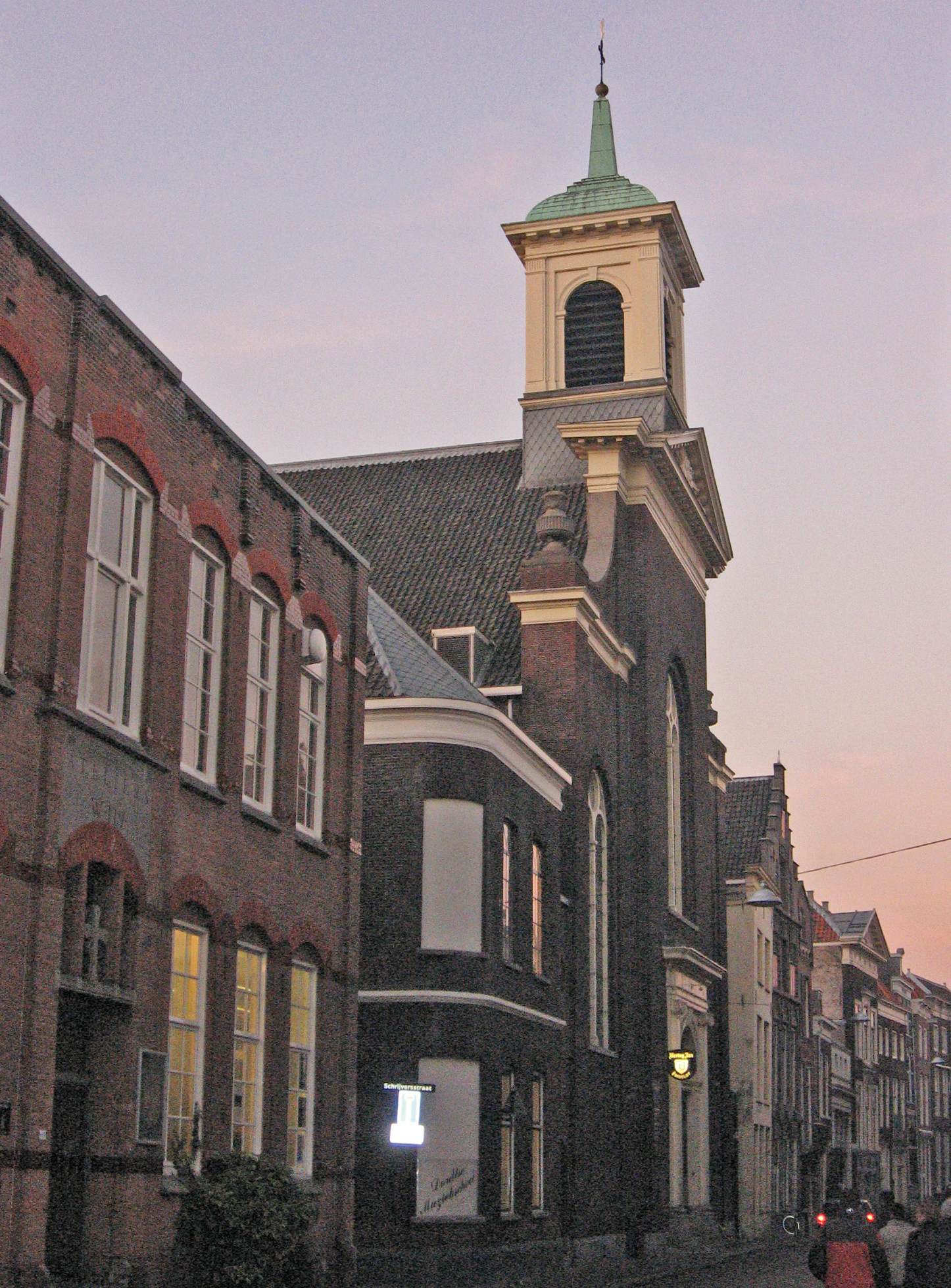 Bonifatiuskerk